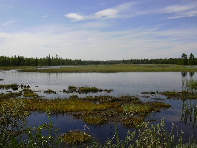 Der Angelikasjön in Arådalen, Jämtland/Schweden; the lake Angelikasjön in Arådalen, Jämtland/Sweden